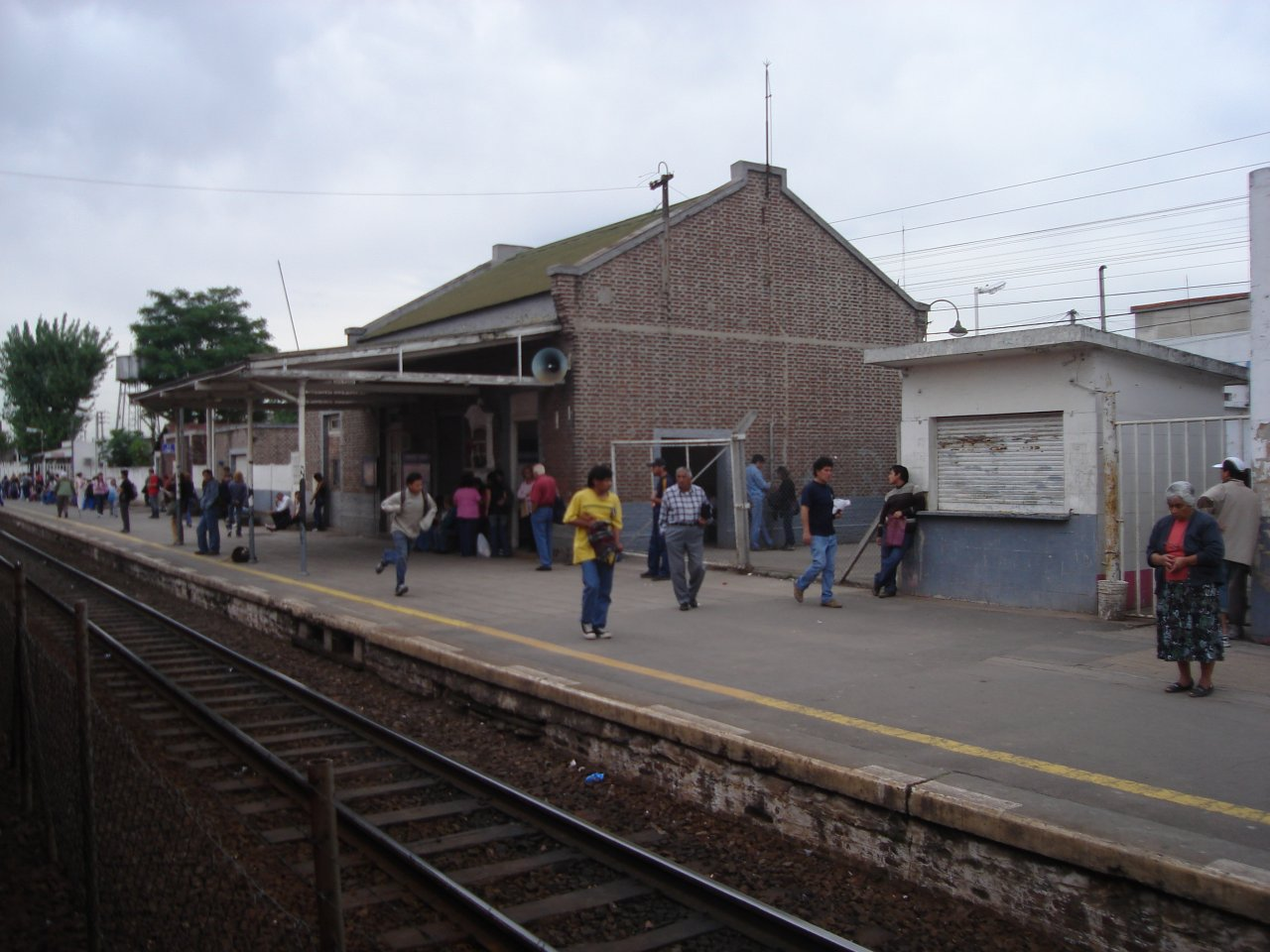 Vista del edificio principal de la estación Los Polvorines del Ferrocarril General Belgrano. Los Polvorines, partido de Malvinas Argentinas, provincia de Buenos Aires, República Argentina.